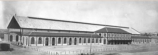 Estación de Delicias, en Madrid (España), recién terminada. Años 1880-1882.